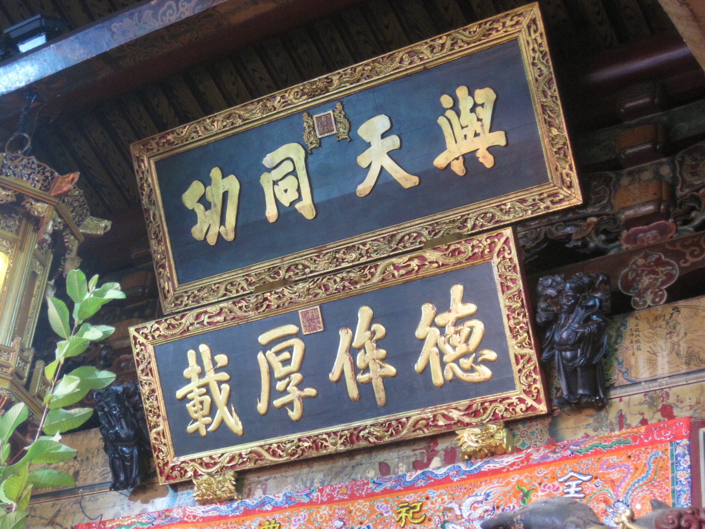 大天后宮御匾；咸豐的「德侔厚載」和光緒的「與天同功」